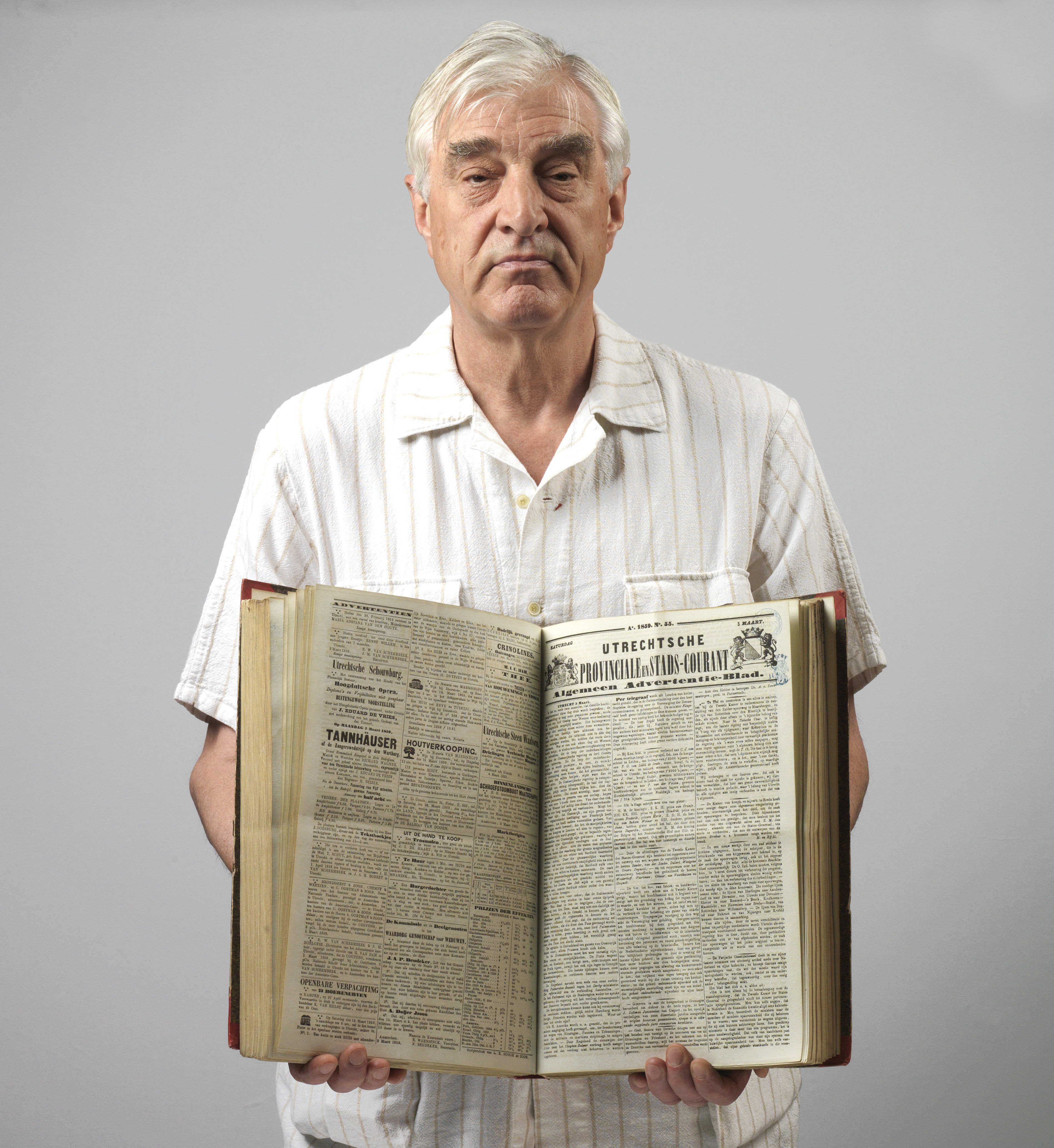 Portret van Bernard Martens van Vliet (1938-2011), oud-journalist en schrijver van het boek 'De vollekstaol van de stad Uterech', gefotografeerd met zijn 'favoriete archiefstuk' (een legger van de Utrechtsche Provinciale en Stads-Courant) uit de collectie van Het Utrechts Archief.Het portret is gemaakt voor een reeks portretten in de vaste expositie van Het Utrechts Archief in de op 28 juni 2008 geopende locatie aan de Hamburgerstraat 28. Hiervoor zijn enkele vaste bezoekers van de studiezaal aan de Alexander Numankade gefotografeerd met hun favoriete archiefstuk.